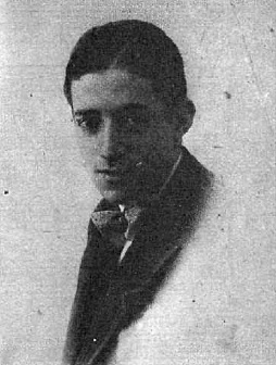 Fotografía del actor argentino Ricardo de Rosas publicada en 1926 con motivo de una gira realizada por España.